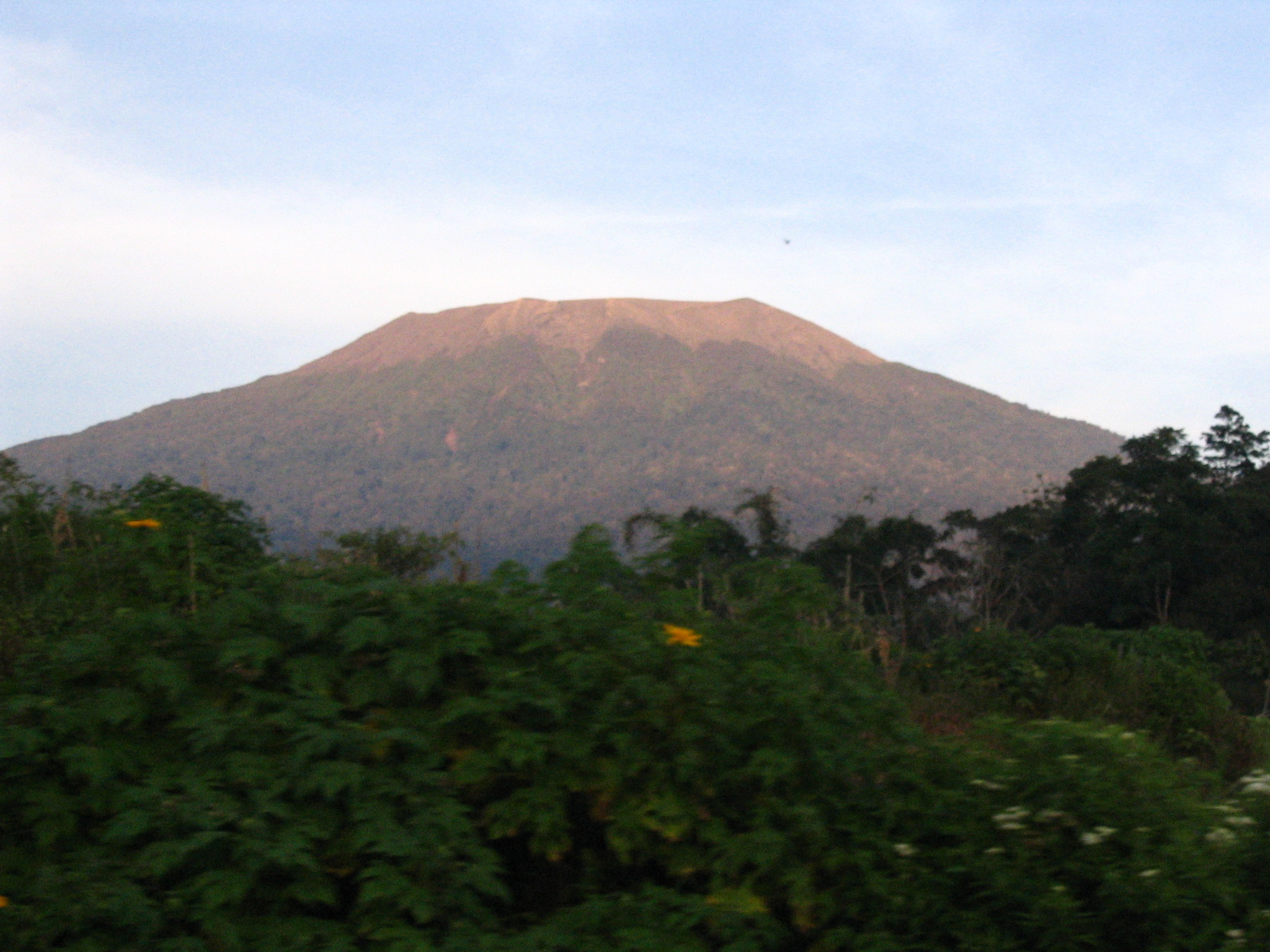 Volcán Marapi visto desde Bukittinggi, Sumatra Occidental, Indonesia.